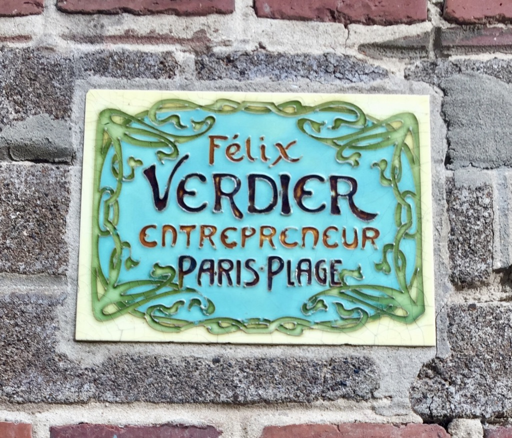 plaque apposée sur le bâtiment nouvellement construit.